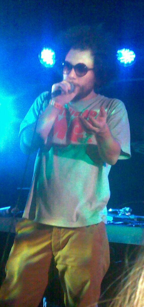 MC Gey vystupuje v klubu Rock Café v Praze společně se skupinou Ty Nikdy, 14.12.2012